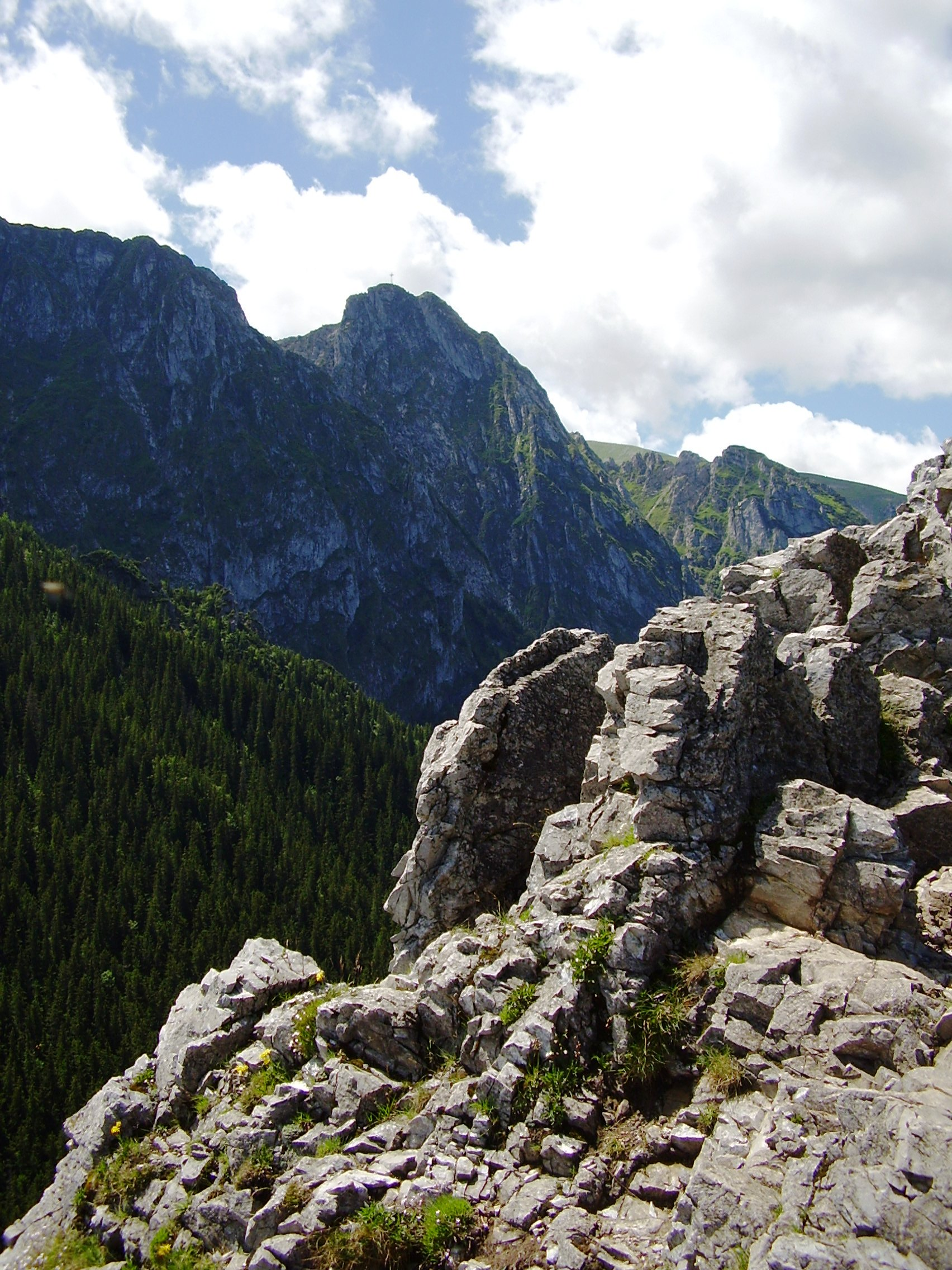 Zakopane, Poland